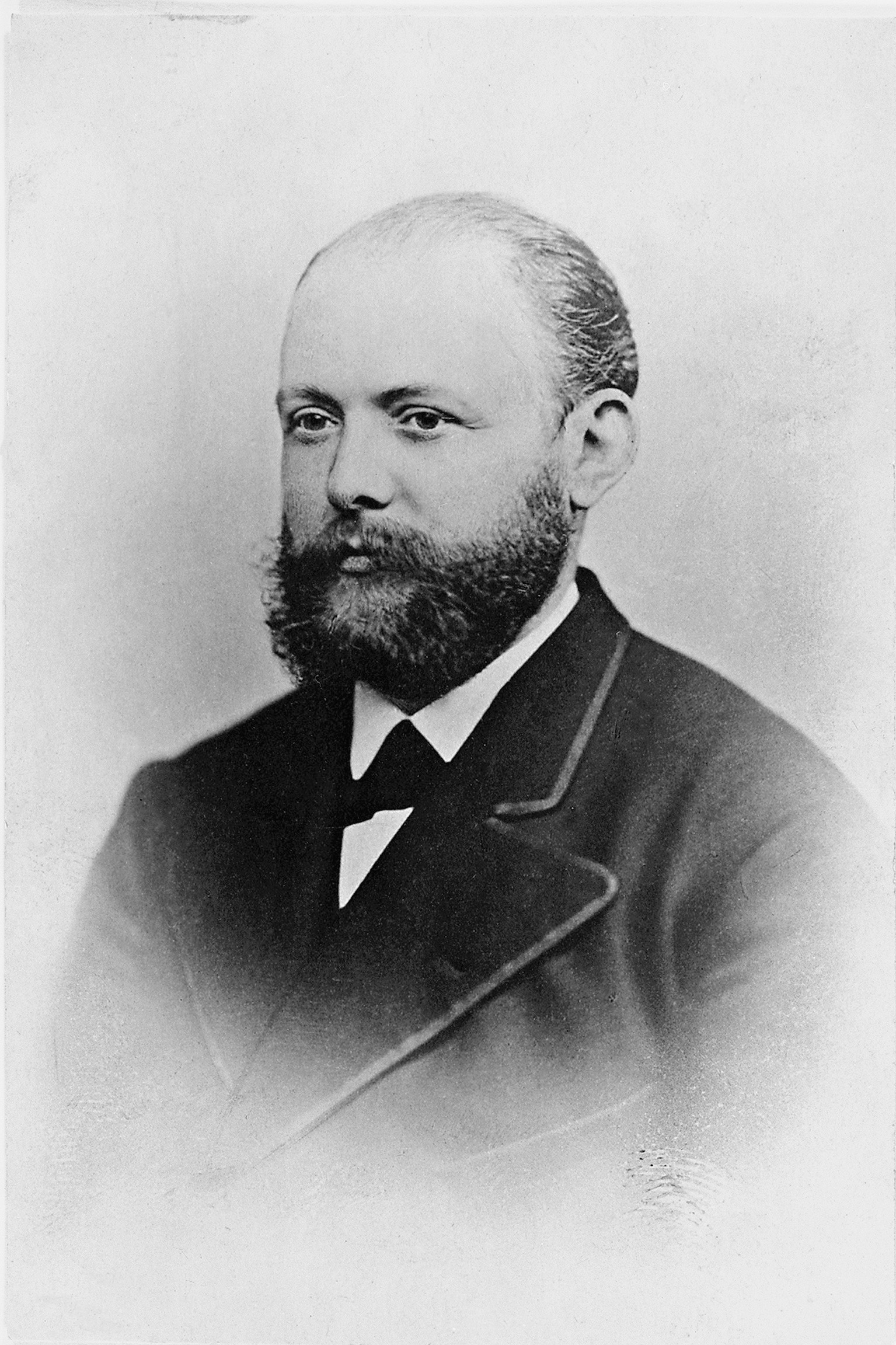 Carl Clemm (* 16. August 1836 in Gießen; † 21. Februar 1899 in Ludwigshafen)